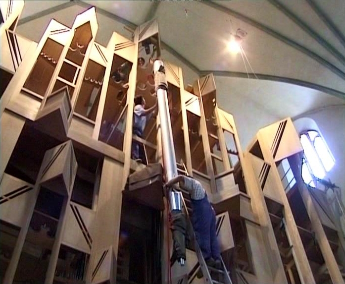 Montage der Prospektpfeifen des Prästant 16' an der Goll-Orgel in St. Martin zu Memmingen.